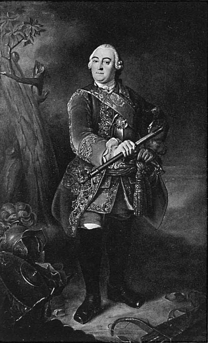 Степан Фёдорович Апраксин (1702 — 1758)